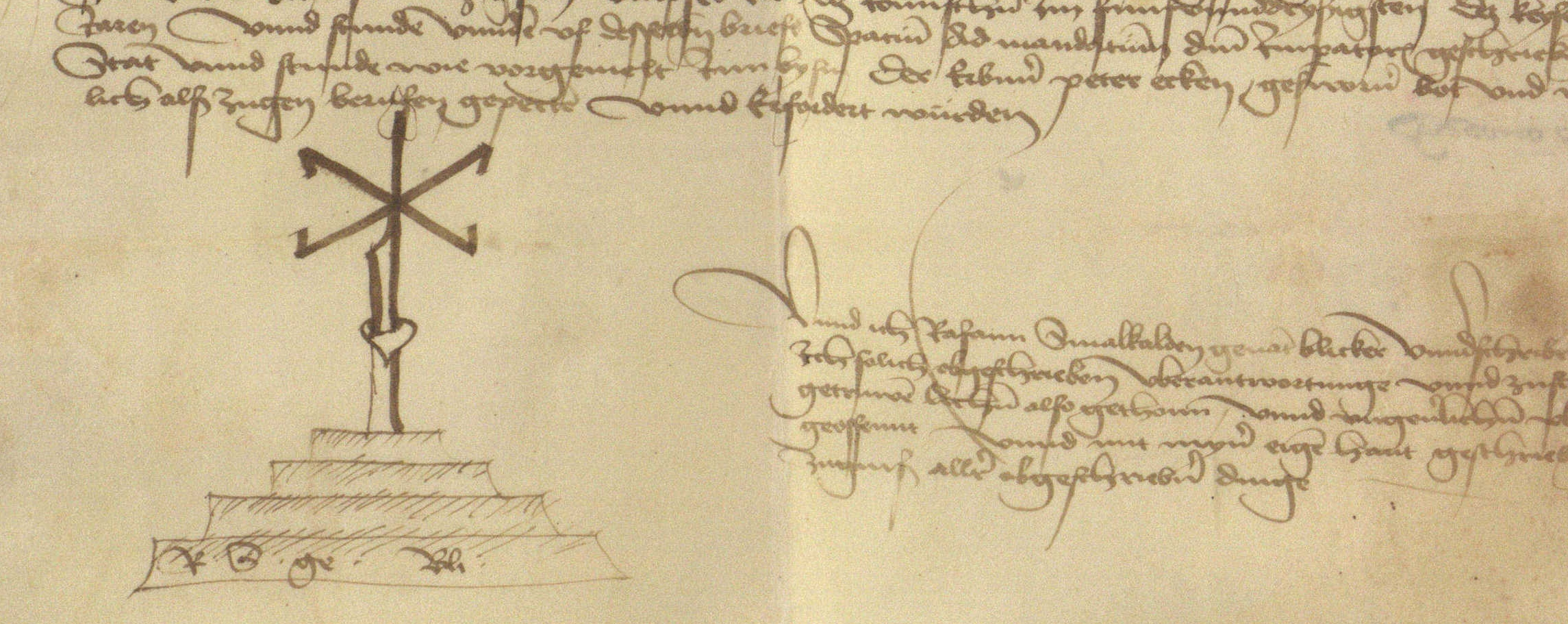 1474 August 8 Notariatsinstrument des Unterschreibers und Notars zu Speyer Raban Schmalkalden gen. Blicker im Stadtarchiv Speyer